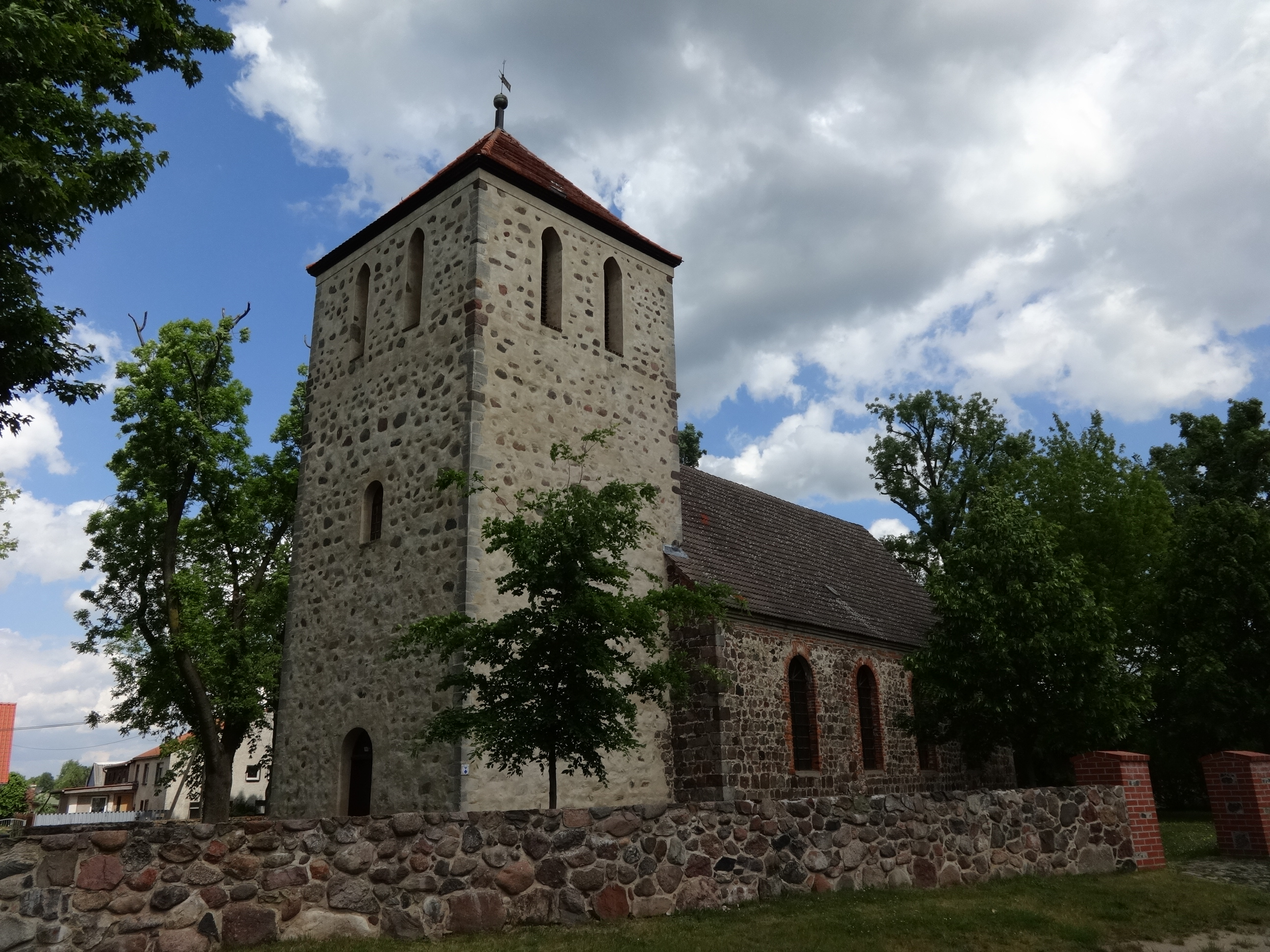 Zisterzienserkirche in Werder (Rehfelde). In einer Glocke ist eine stilisierte Lilie als Zeichen der Zisterzienser zu sehen.